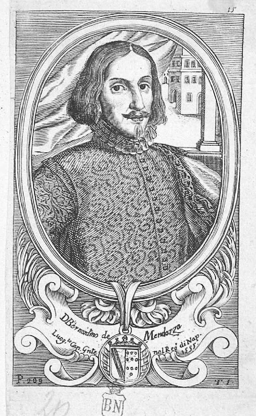 Bernardino de Mendoza. Grabado calcográfico anónimo recogido en Teatro eroico, e politico de'governi de'Vicere del Regno de Napoli, de Domenico Antonio Parrino, Nápoles, 1692-1695. Biblioteca Nacional de España.